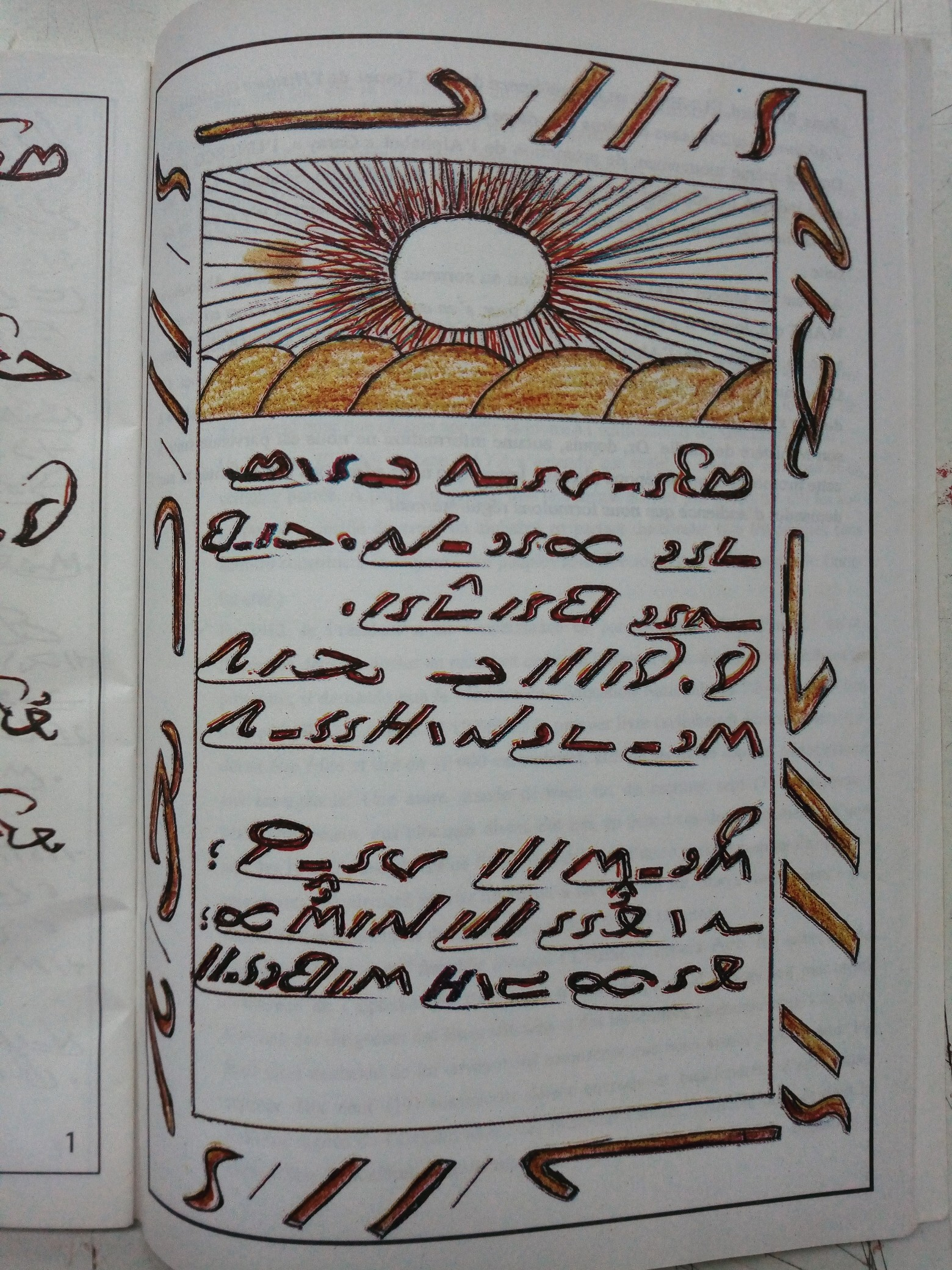 Planche tirée du syllabaire Garay (El Hadji Assane Faye)